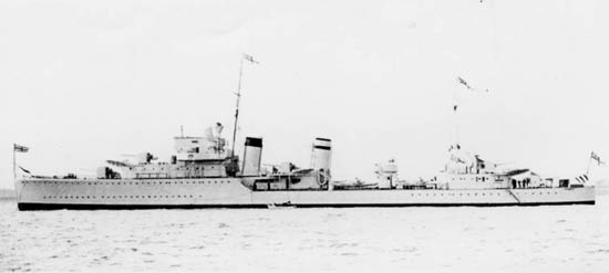 Der britische Flottillenführer Grenville (H03)